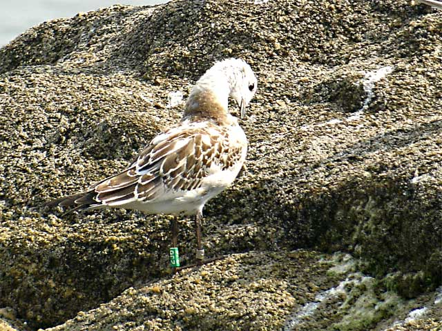 young mediterranean gull